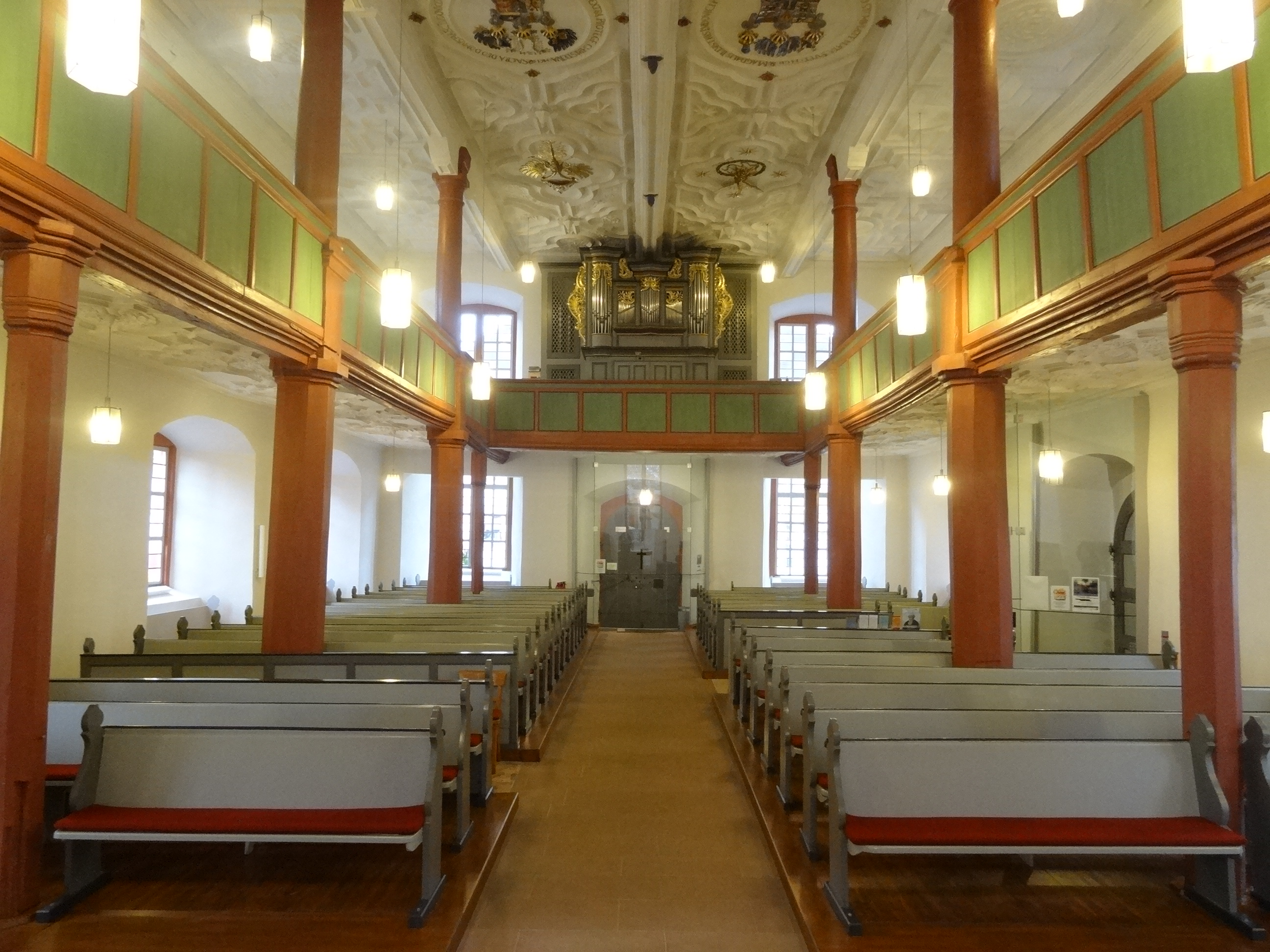 Stadtkirche zum Heiligen Geist (Nidda)